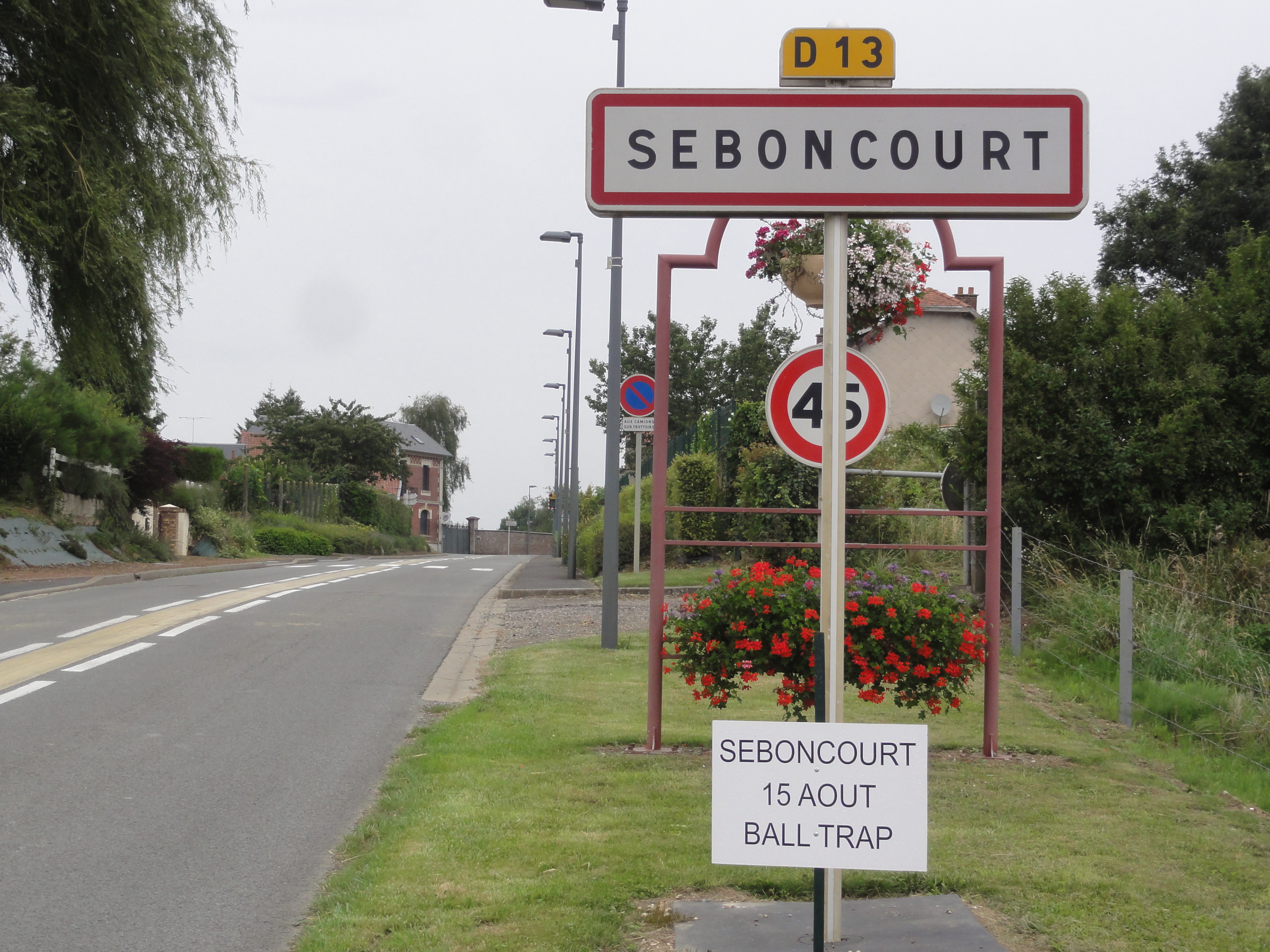 Seboncourt (Aisne) city limit sign